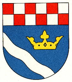 Wappen von Kronweiler